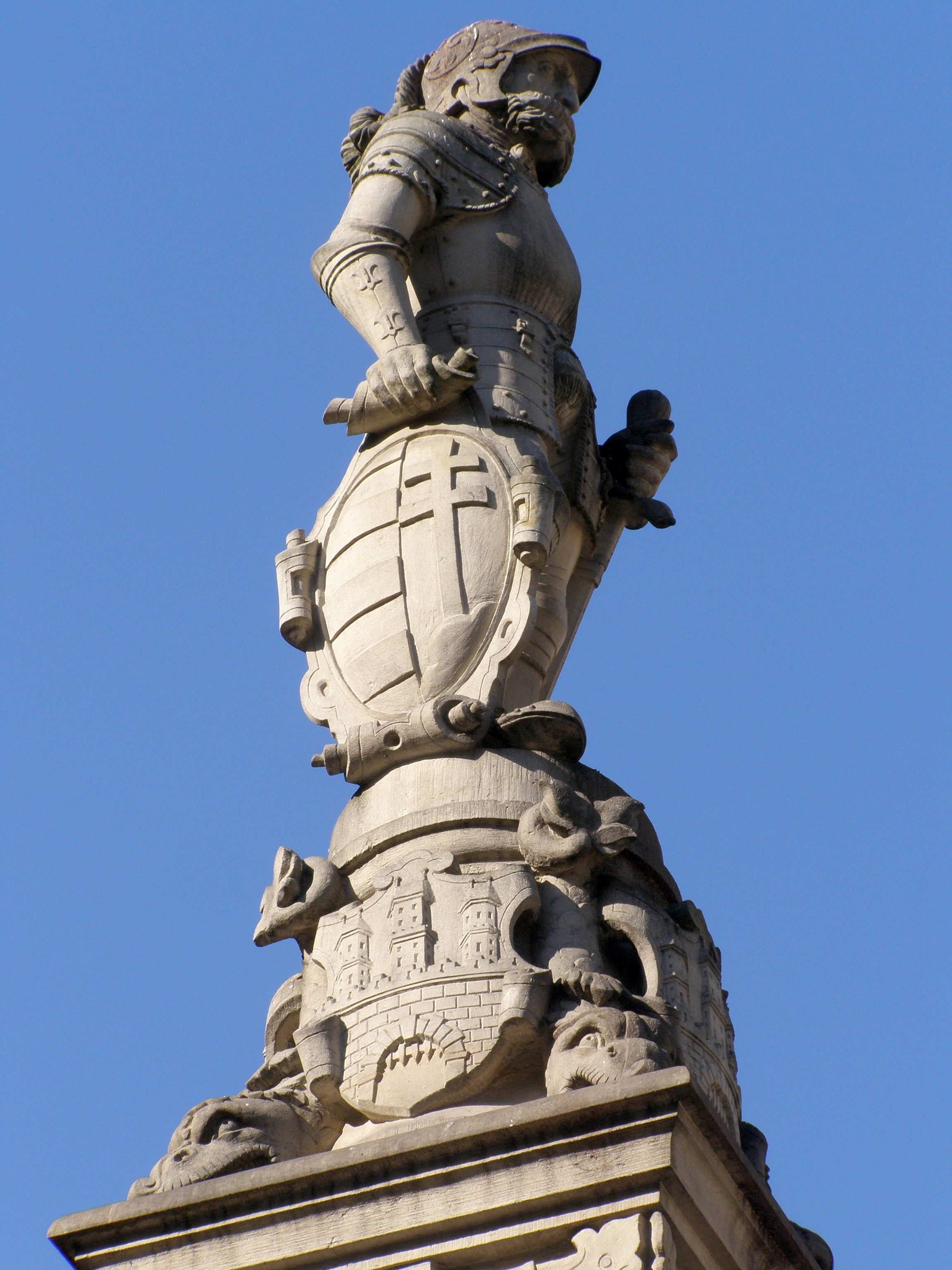 Socha kráľa Maximiliána II. ako rytiera držiaceho uhorský znak